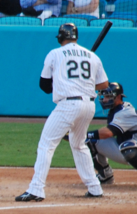 Ronny Paulino